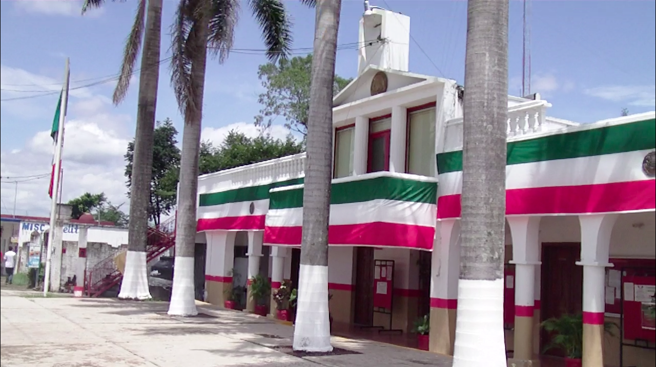 Palacio Municipal Municipio Emiliano Zapata, Veracruz, México.